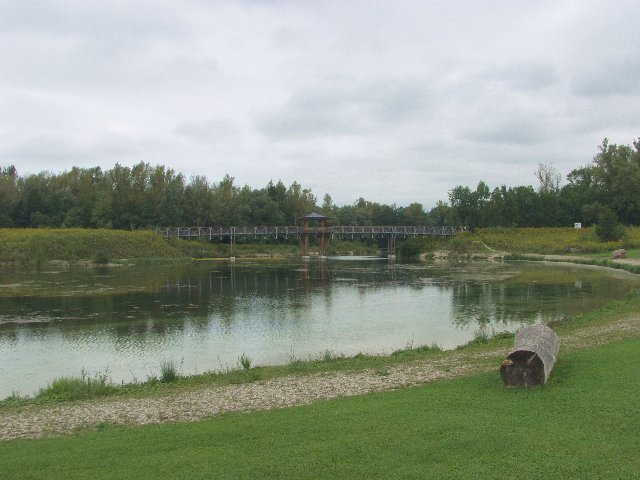 Kleiner Weikerlsee mit Brückenkonstruktion - selbst fotografiert im September 2005 (der greg:) 10.09.2005